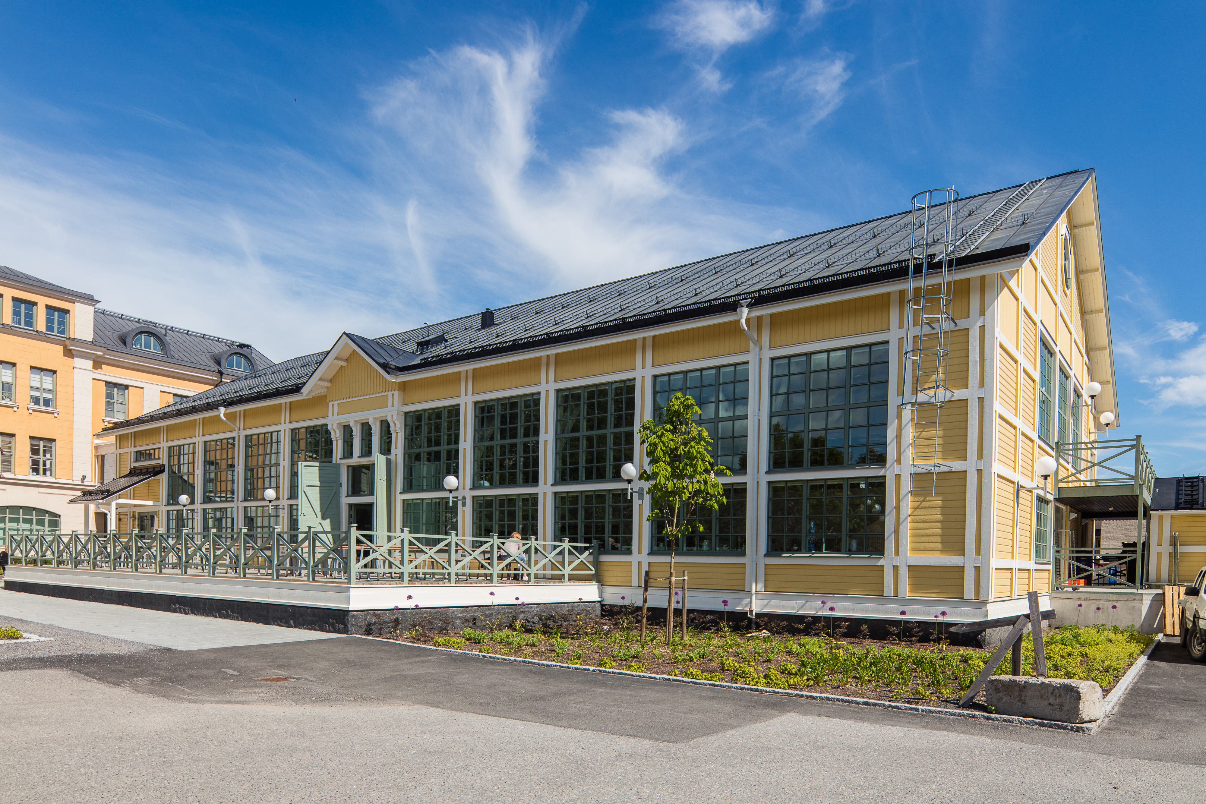 Restaurang Översten är en personalrestaurang på stadshusområdet i Umeå (i en byggnad som tidigare tillhört regementet K4).